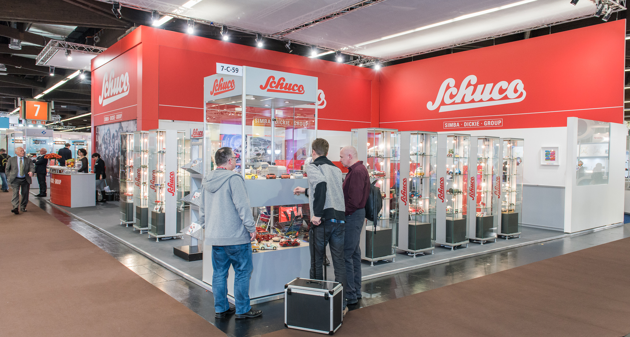 International Toy Fair Nürnberg,Messestand,Schuco,Simba-Dickie-Group,Spielwarenmesse